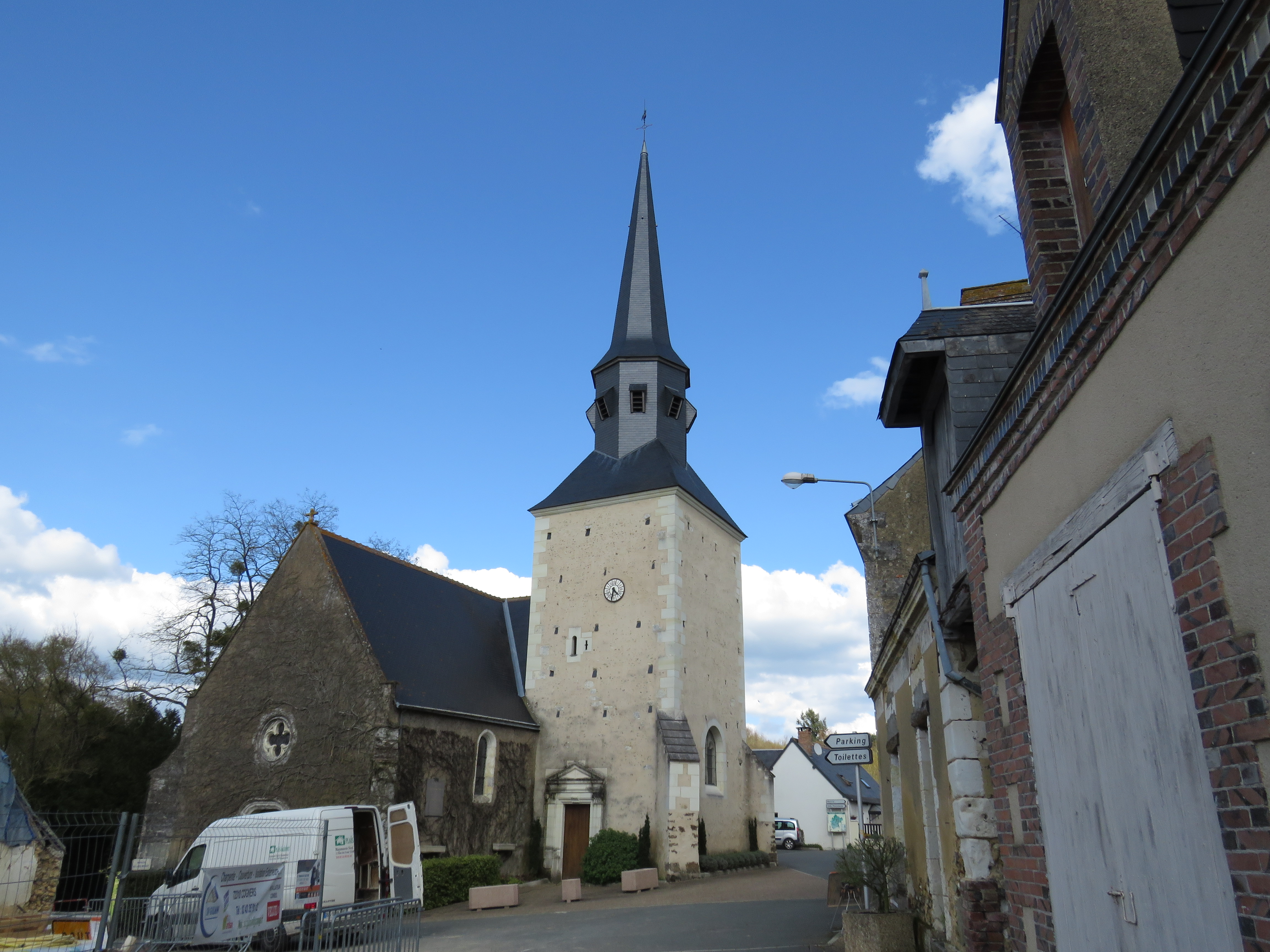 Église de Cogners.